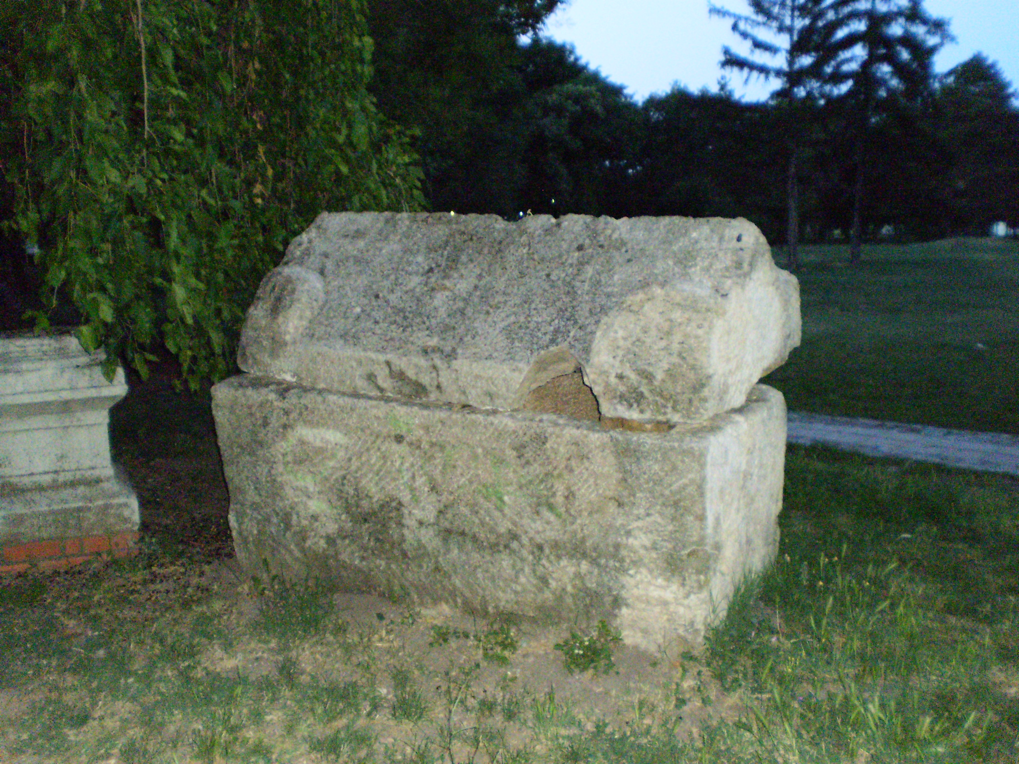 Serbia, Sarkofag iz Niške Banje otkopan 1935. godine, izložen u lapidarijumu u niškoj Tvrđavi. Autor dr Milorad Dimić, Niš, Srbija. 28. jun 2012.